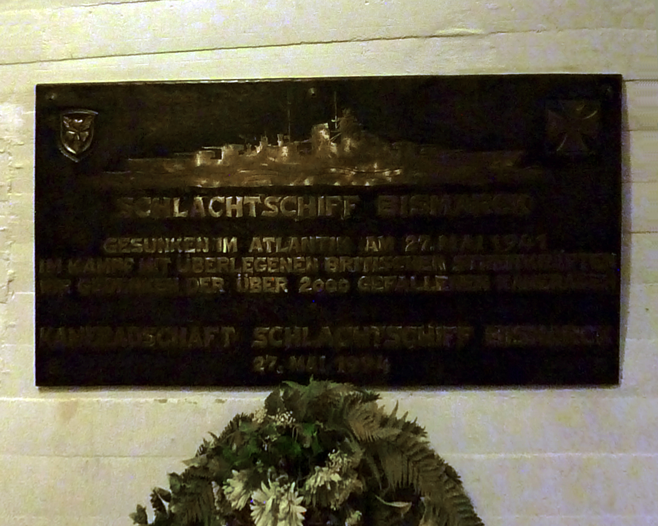 Gedenktafel für die Bismarck im Marineehrenmal Laboe